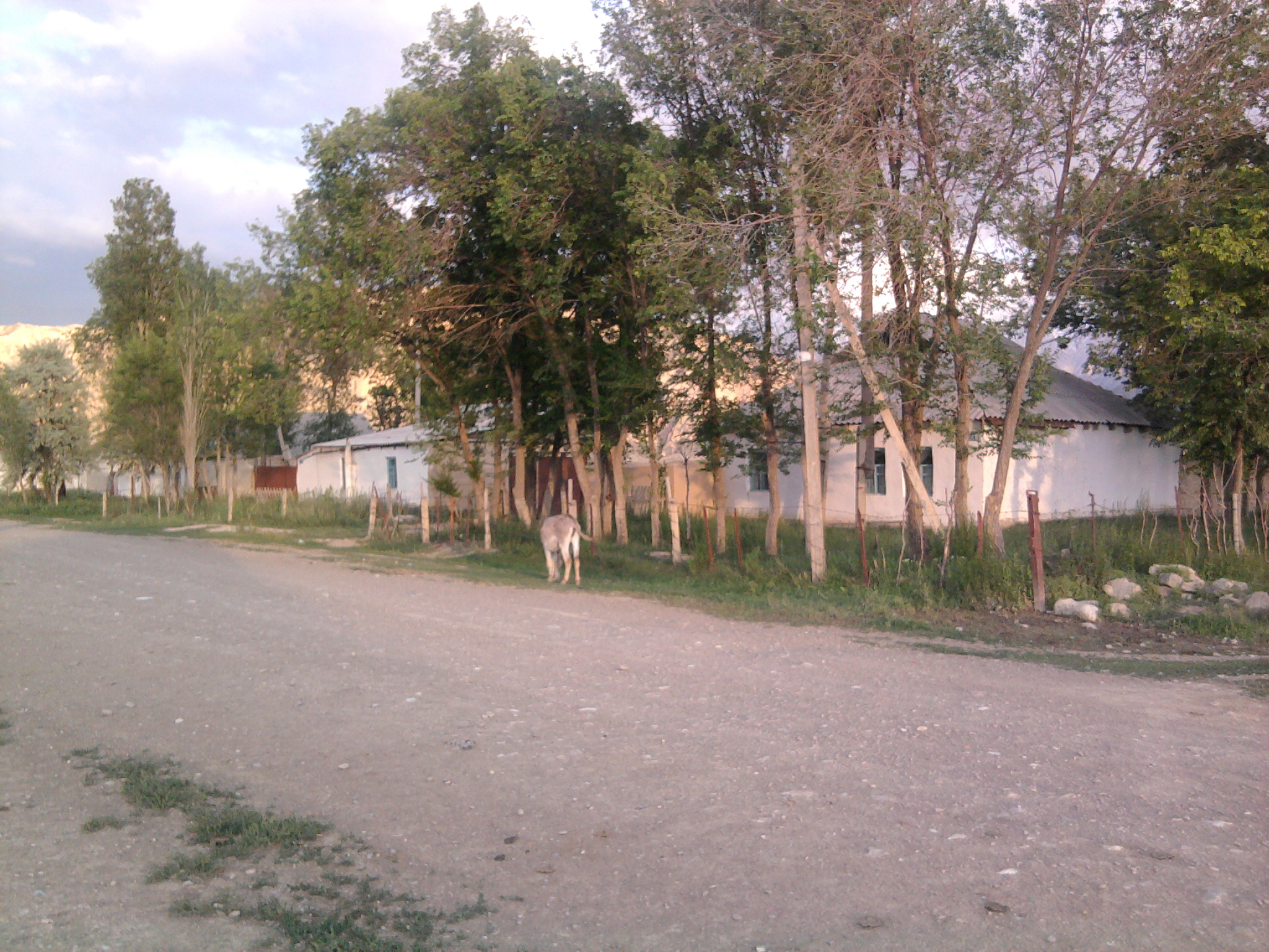 Kosh-Dobo, Kyrgyzstan